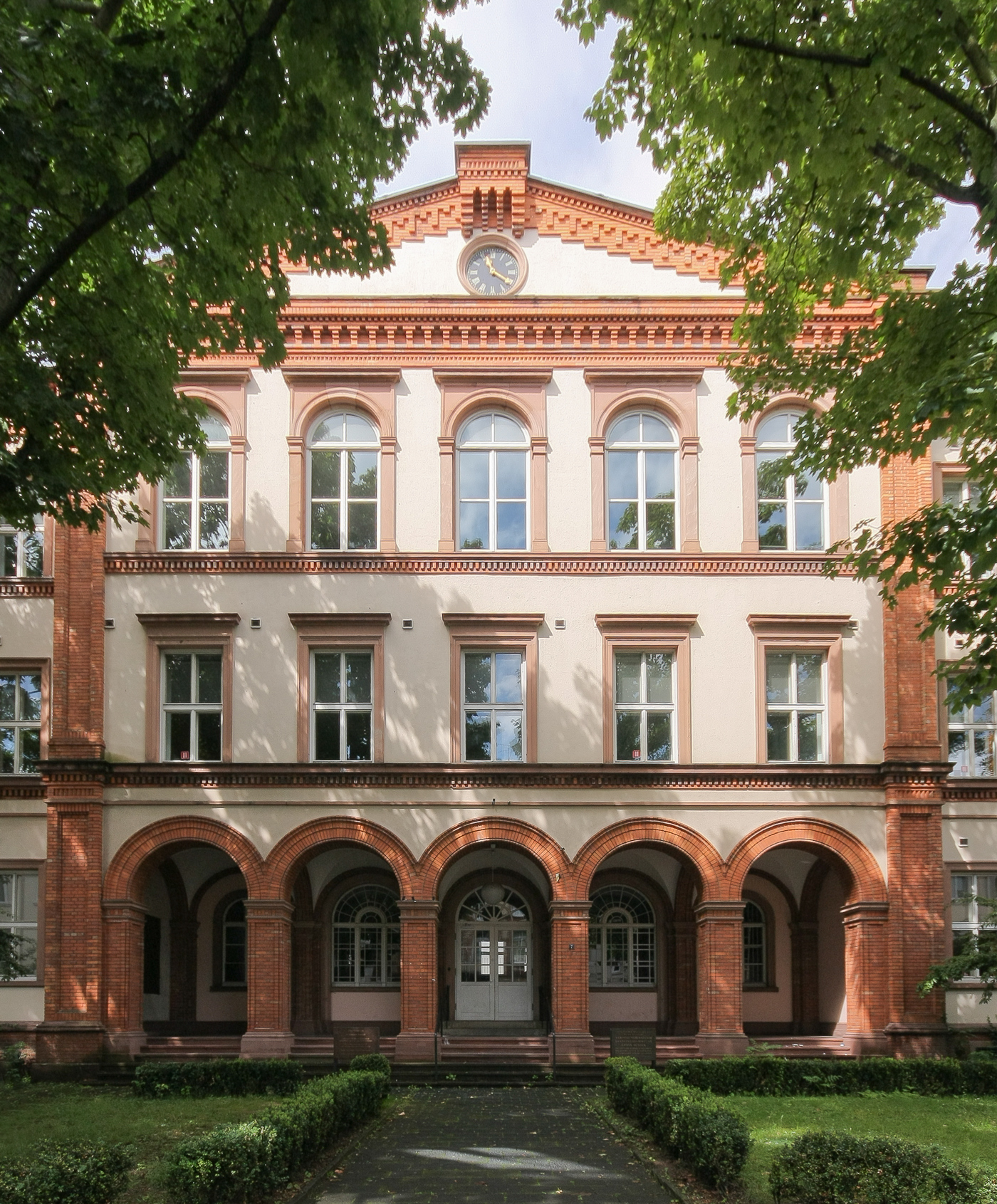 Altbau der Oranienschule in WiesbadenThis is a photograph of an architectural monument.